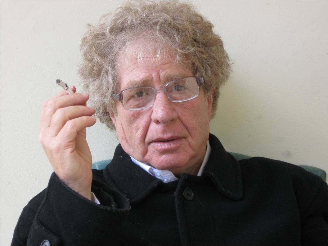 יאיר רובין - תמונת פרופיל2